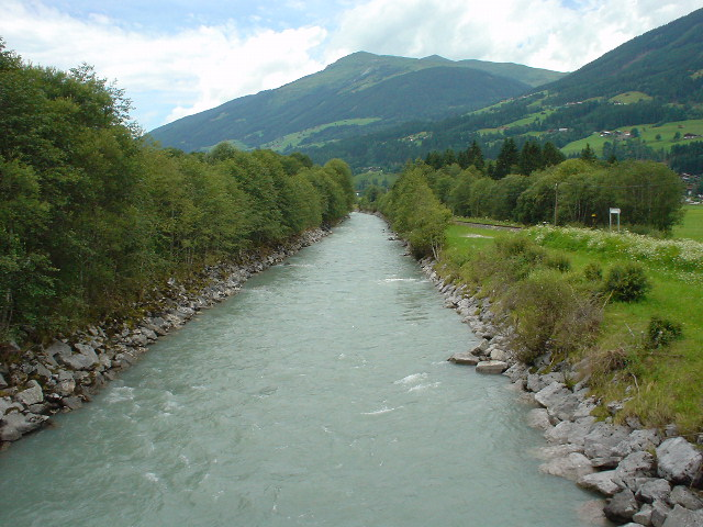 Die Salzach bei Neukirchen am Großvenediger. Blick NW, über Roßberg von Neukirchen, Eingang des Trattenbachtals und links Vorderwaldberg von Wald, darüber Laubkogel (2317 m)